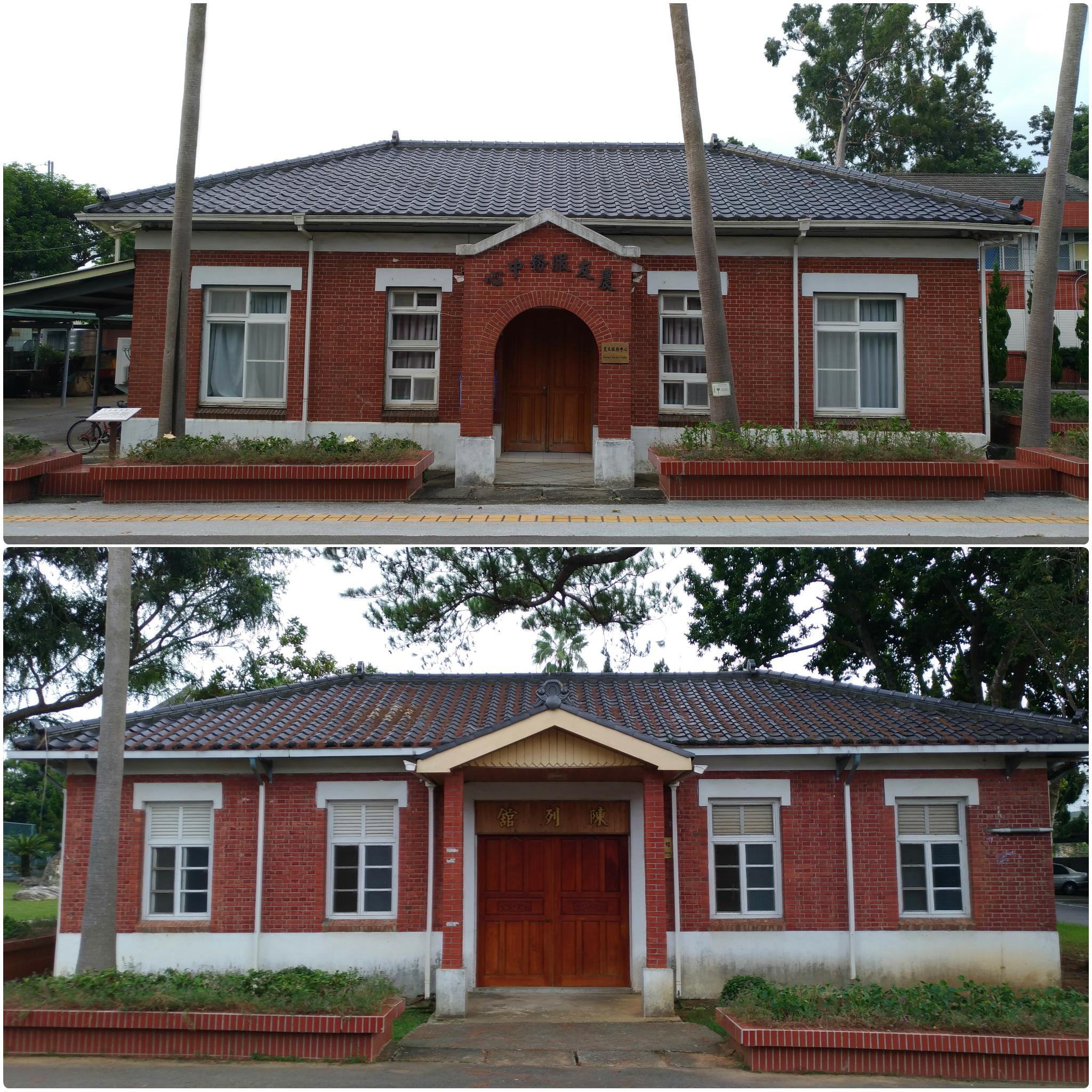 中文（台灣）: 行政院農委會種苗改良繁殖場的文化資產